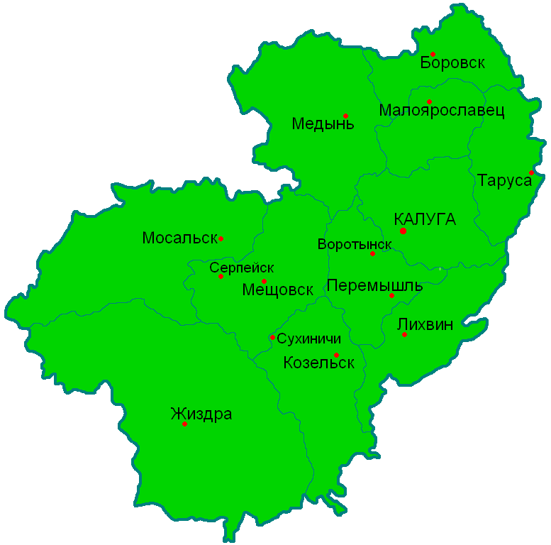 Административное деление Калужской губернии